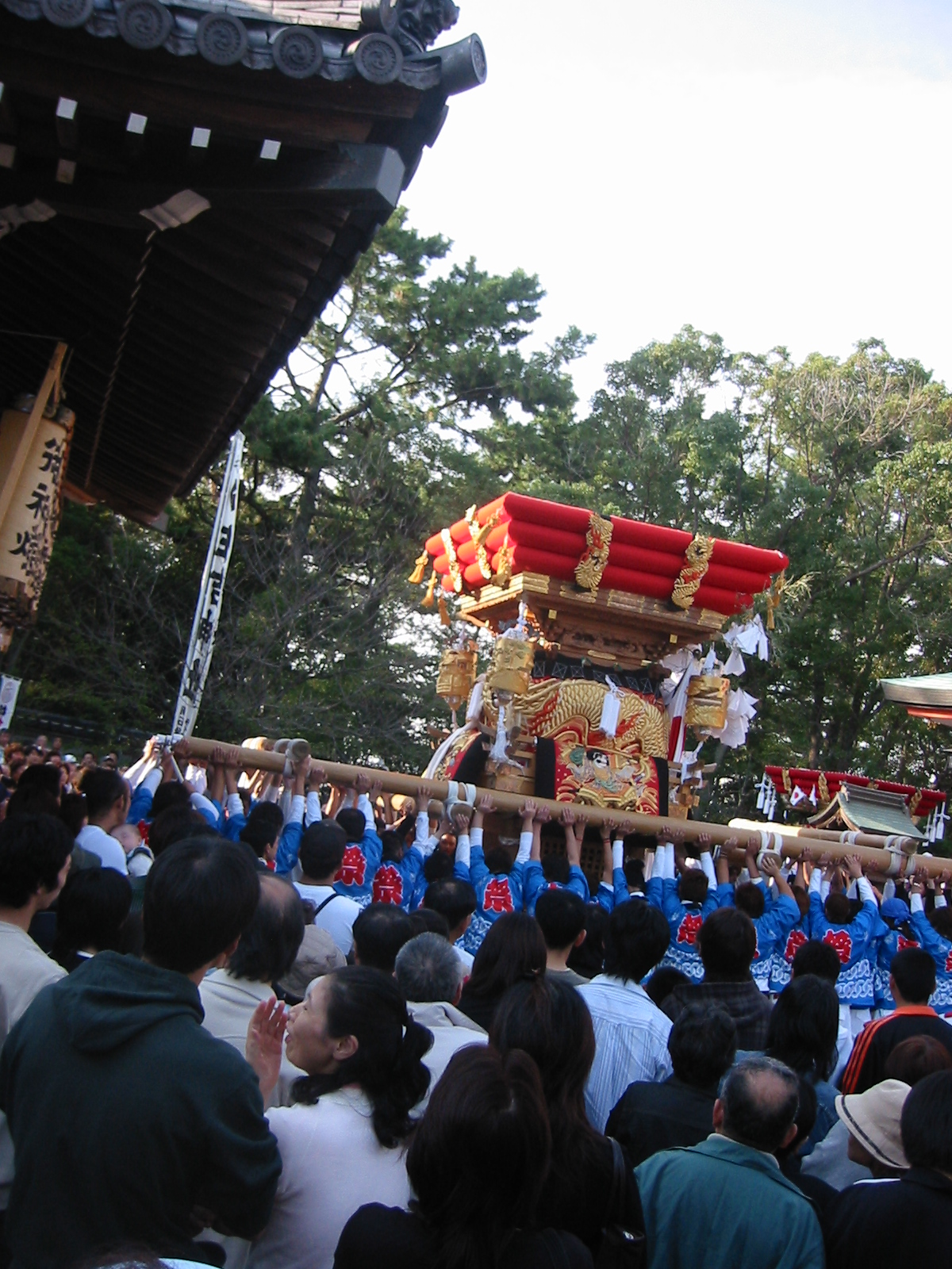 明石魚住 住吉神社 祭り